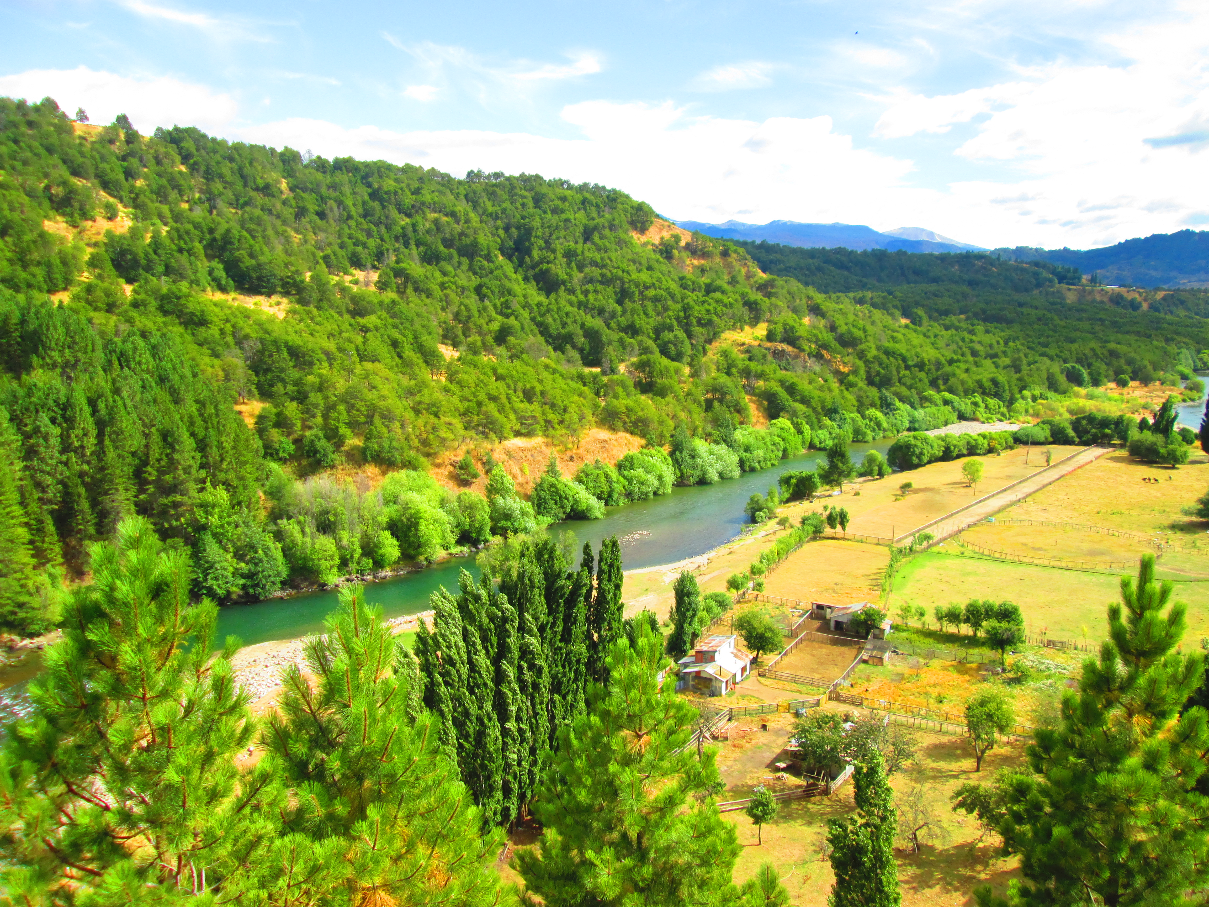 Río Simpson en su paso por la ciudad de Coyhaique, región de Aysén.